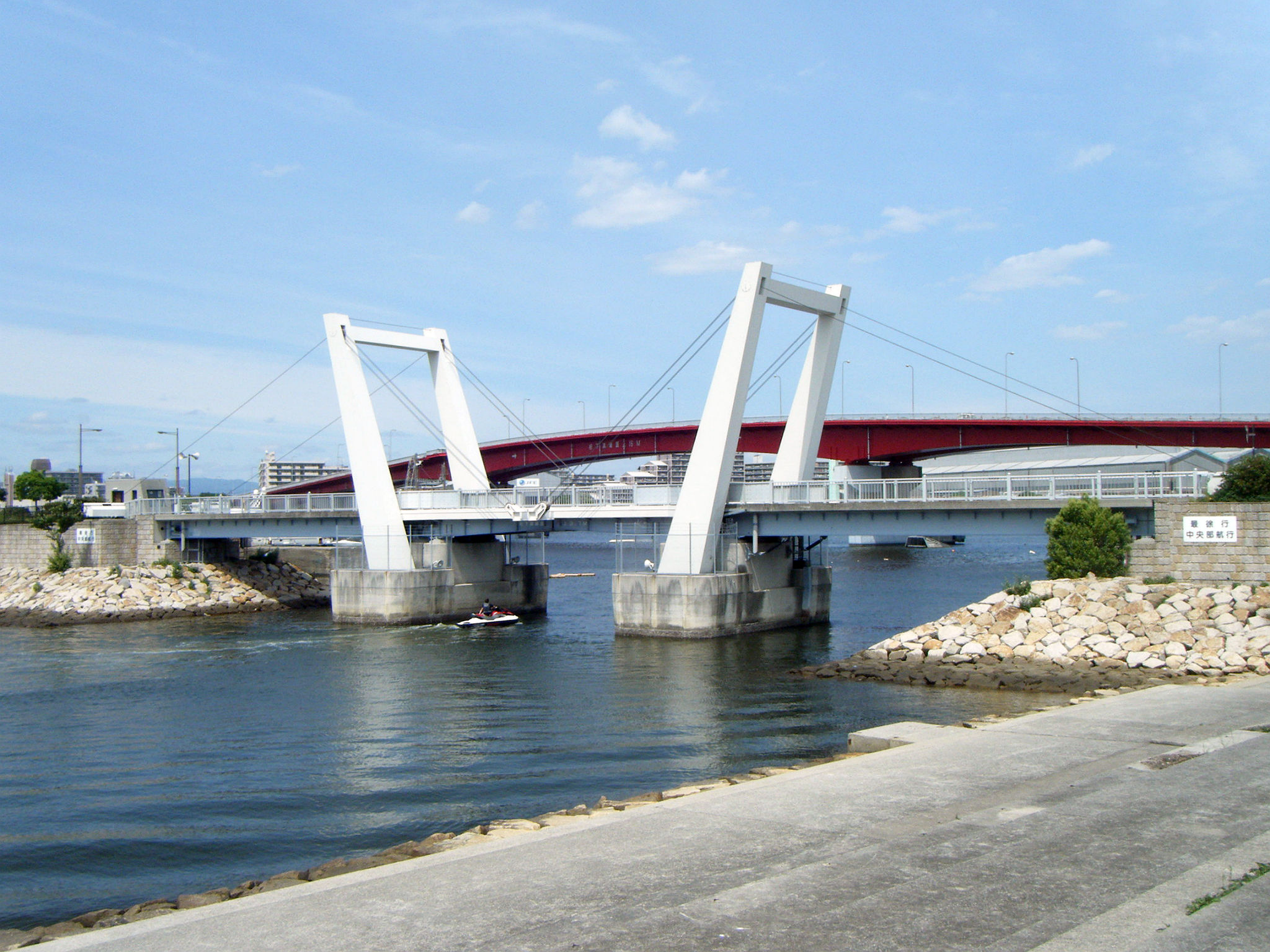 西宮市 御前浜橋 西側全景